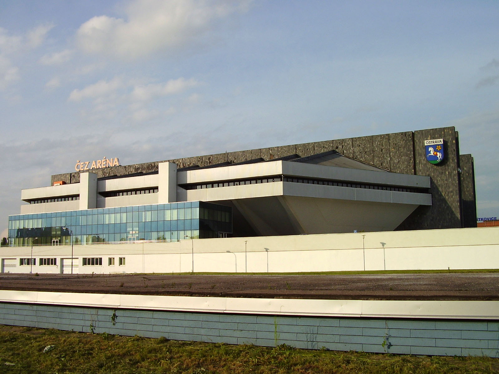 ČEZ Aréna, Ostrava (někdejší Palác kultury a sportu)